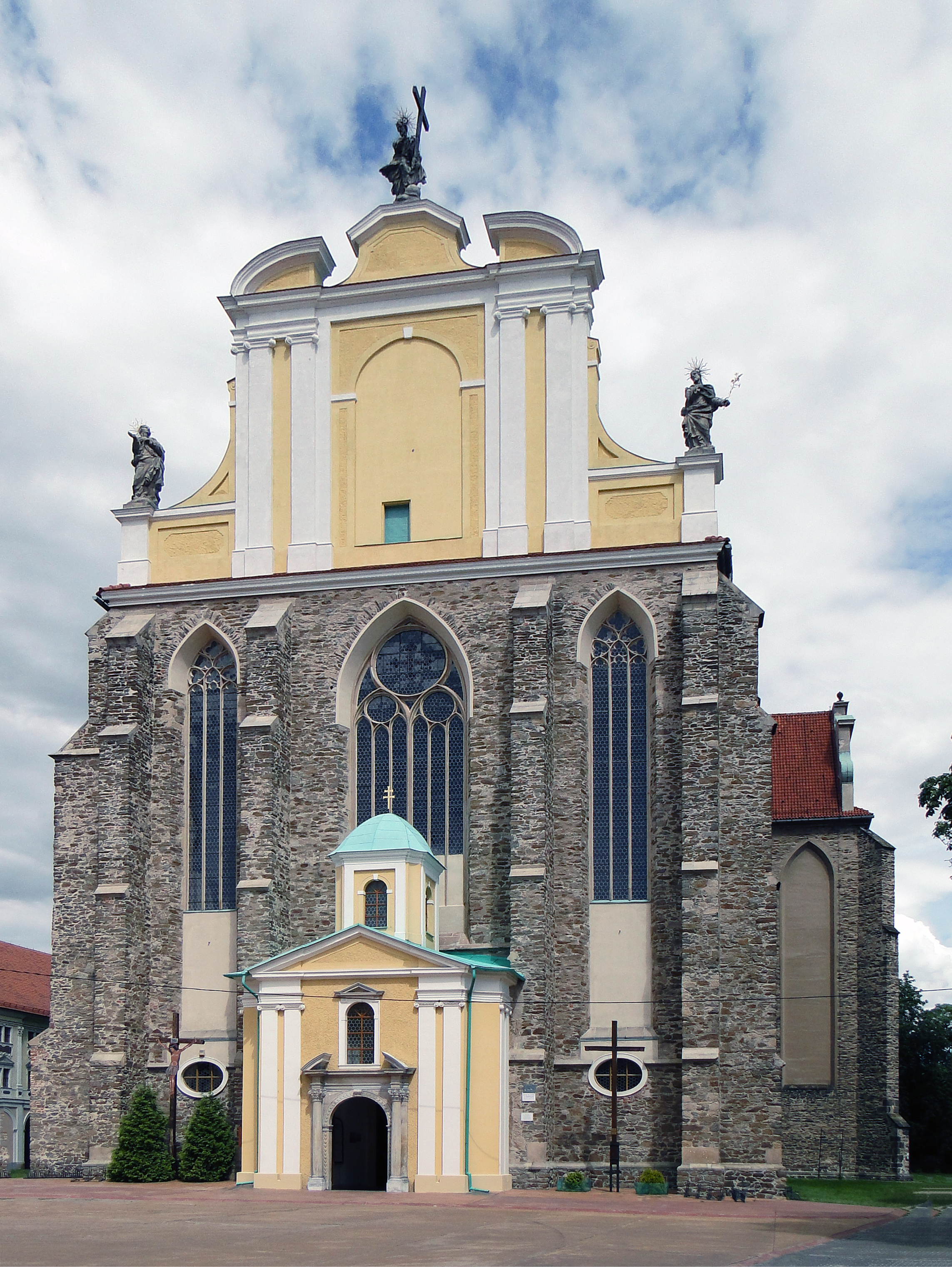 Widok od frontu na okazały kościół p.w. Wniebowzięcia NMP.